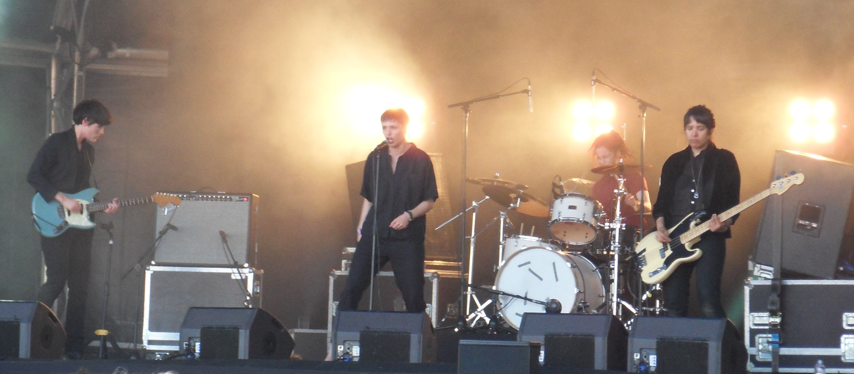 Die Band "Savages" auf dem Festival Primavera Sound 2013 in Barcelona